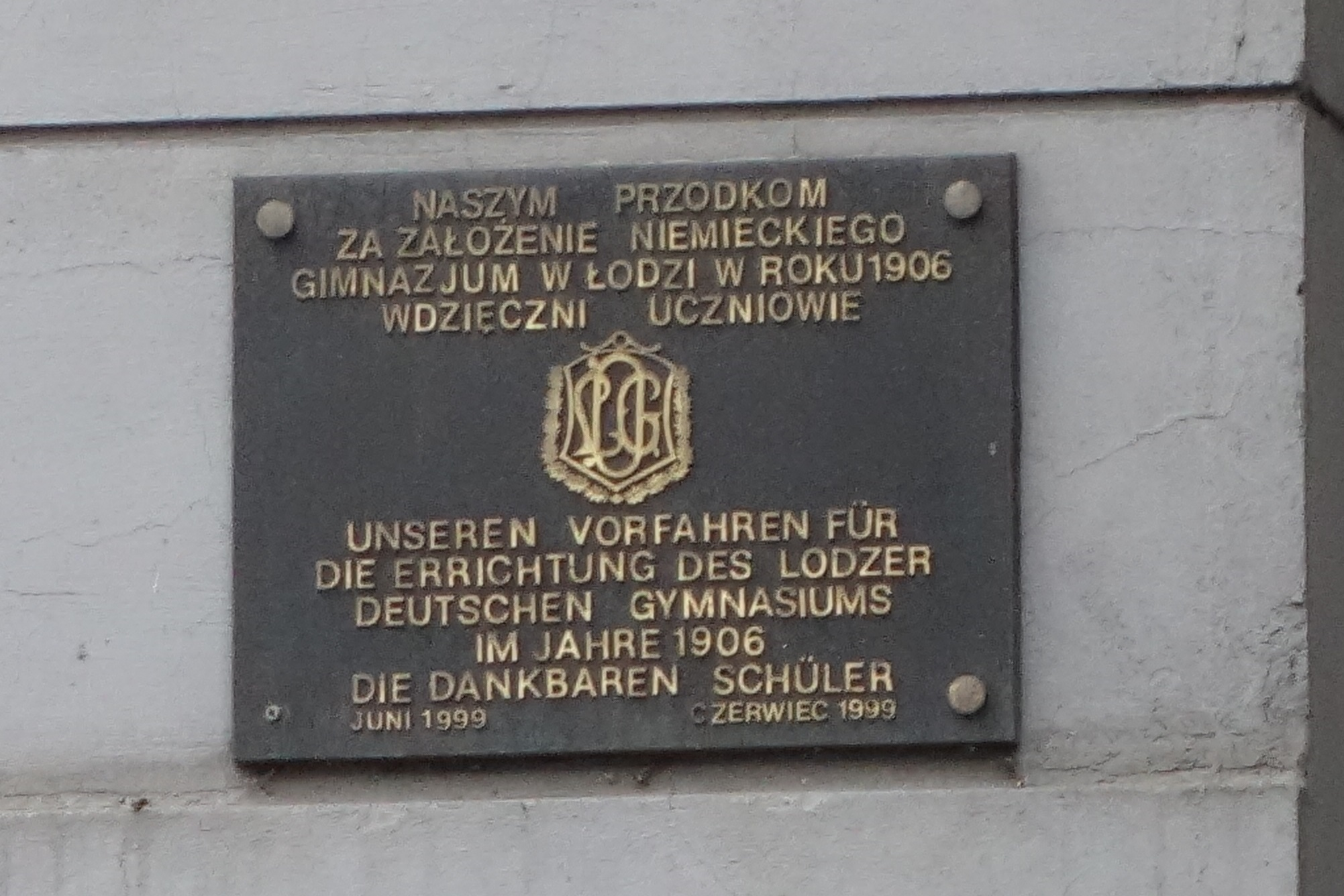 Gedenktafel für das ehemalige Lodzer Deutsche Gymnasium (LDG) am inzwischen auch von der Universität Lodz geräumten Gebäude